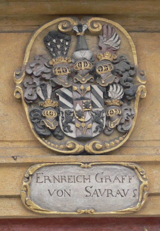 Graz, Zeughaus, Fassade Wappen am Portal